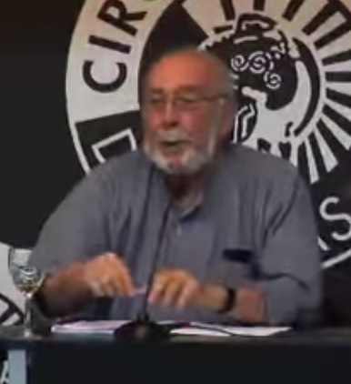 Ponencia de Eduardo Mangada.